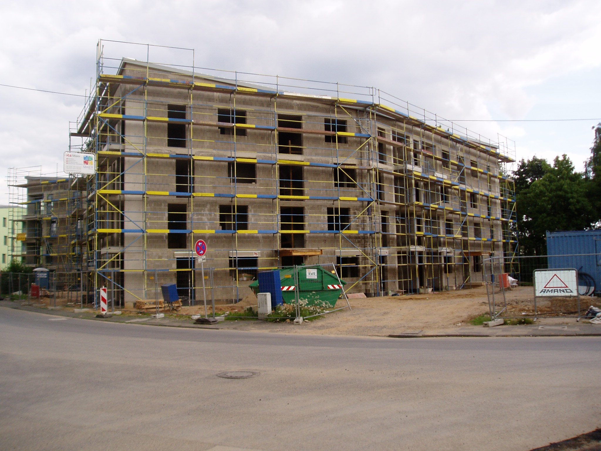 Rohbau am Buchheimer Weg in Köln-Ostheim